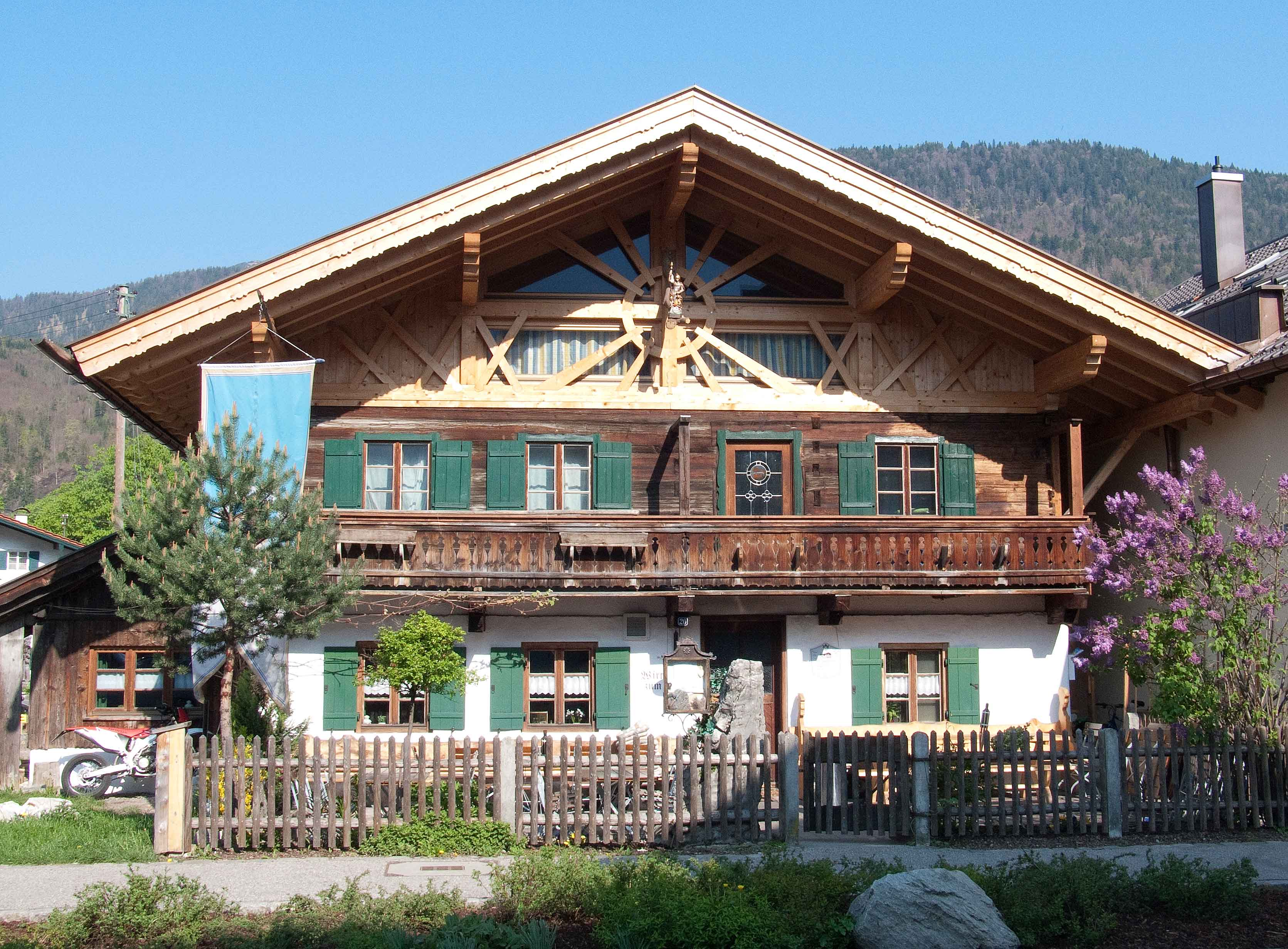 Ostteil mit Blockbauobergeschoss